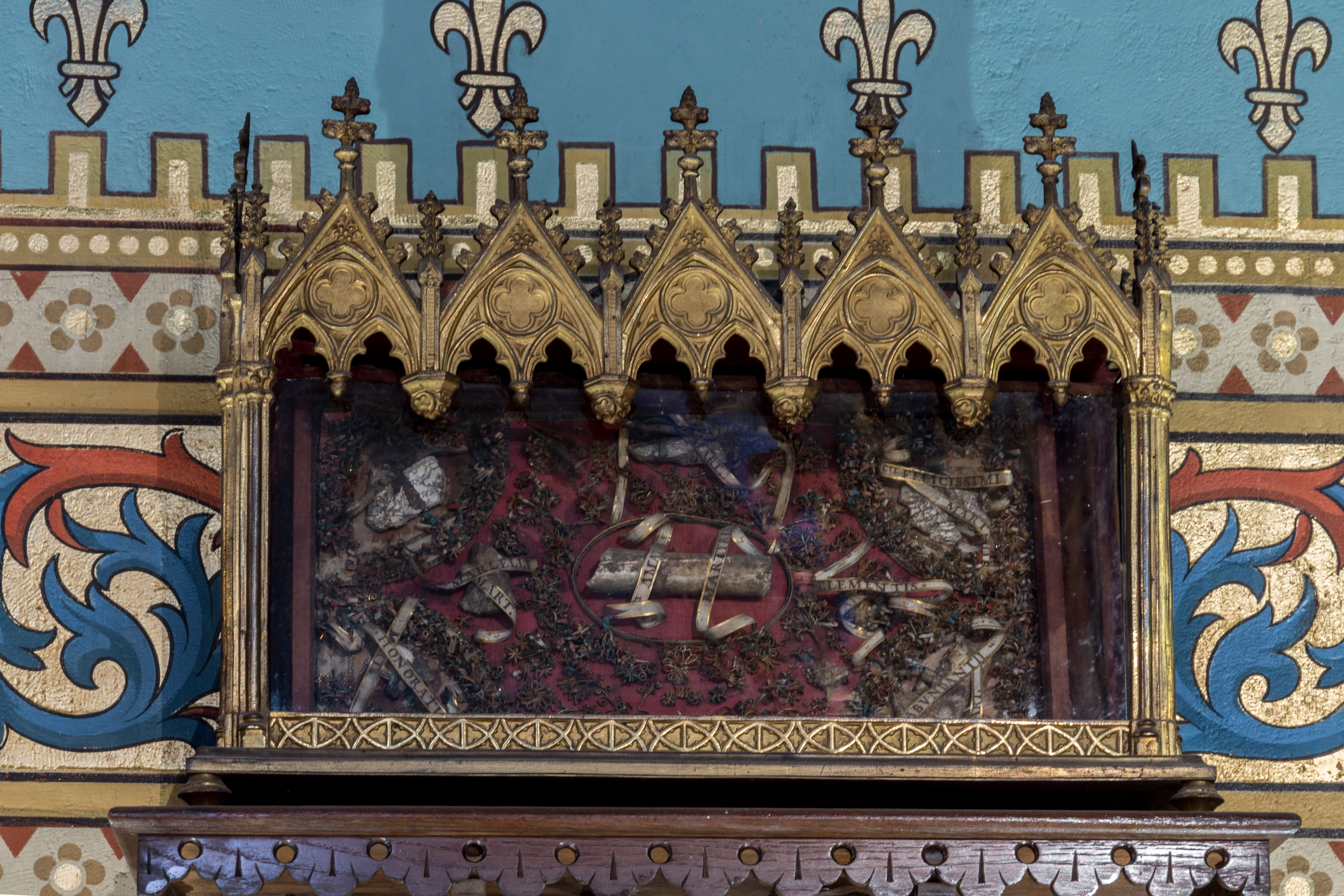 Chapelle de Condat Libourne Gironde